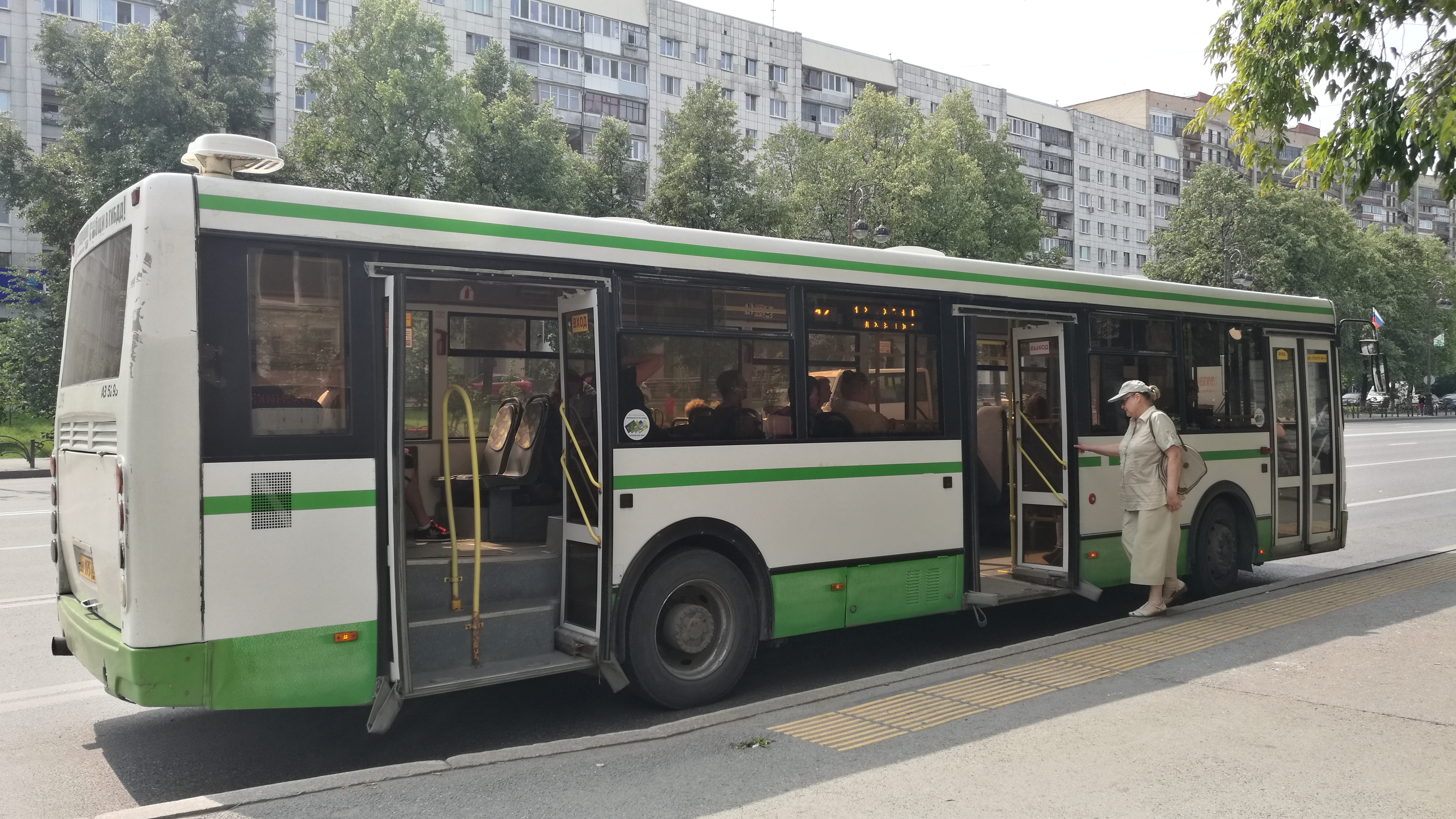 Buso en strato Respubliko. Tjumeno, Rusio.